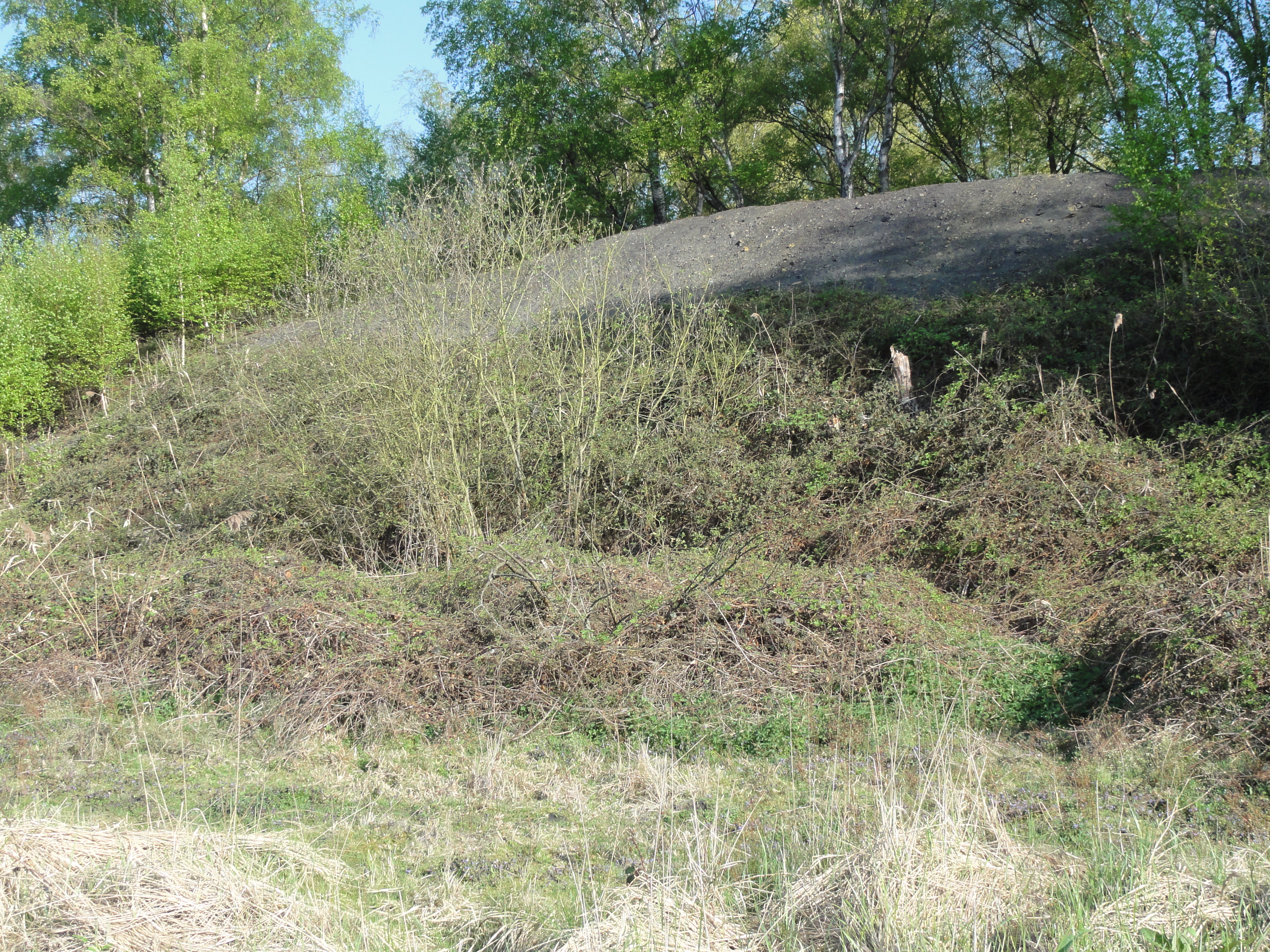 Terril n° 124A dit 1 de Flines Centre, Fosse n° 1 Saint Charles de la Compagnie des mines de Flines puis de la Compagnie des mines d'Aniche, Flines-lez-Raches, Nord, Nord-Pas-de-Calais, France.